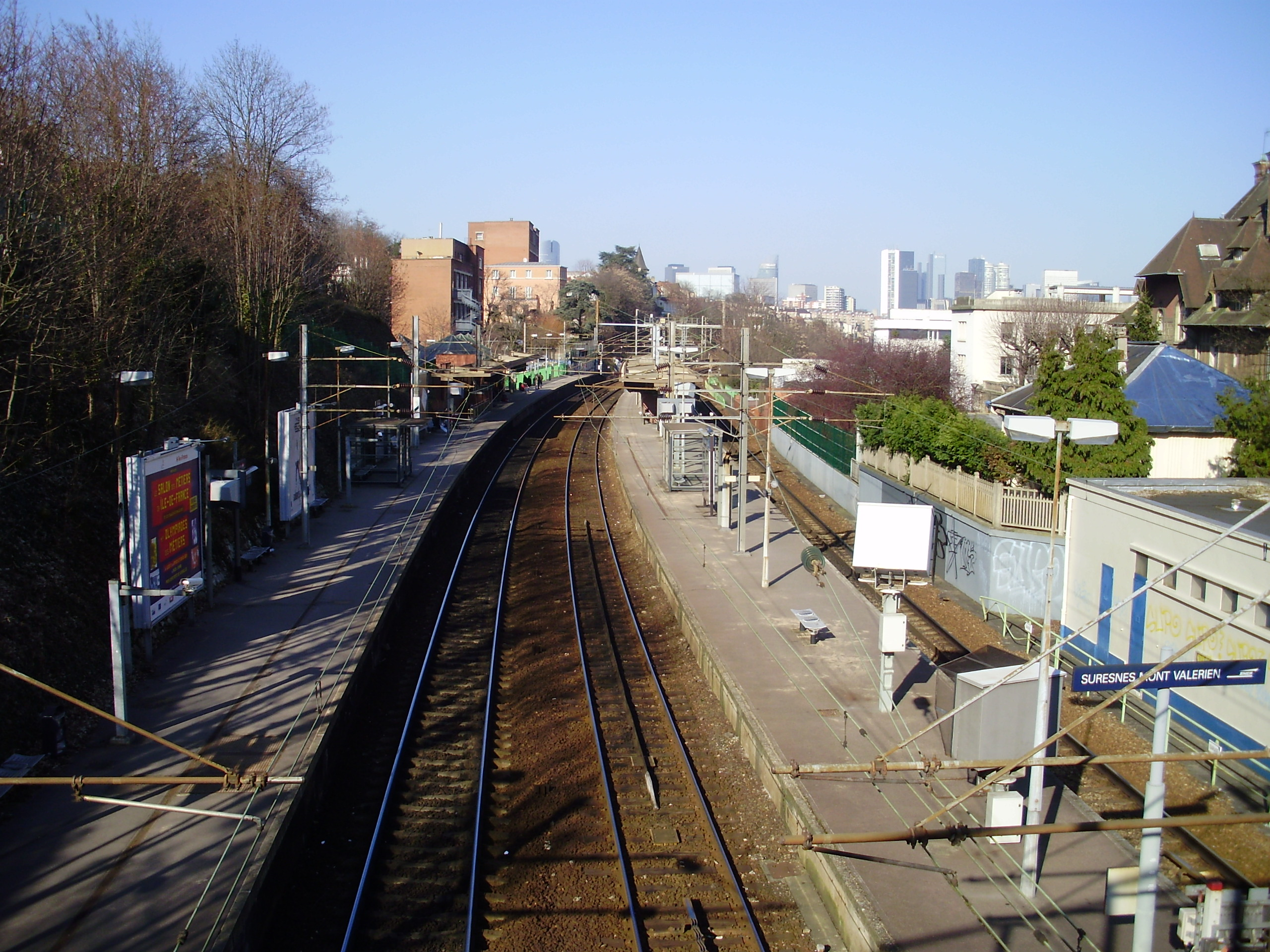 Gare de Suresnes-Mont-Valérien, à Suresnes, Hauts-de-Seine, France (Vue en direction du nord, depuis la passerelle de la rue du Calvaire, au sud de la gare)